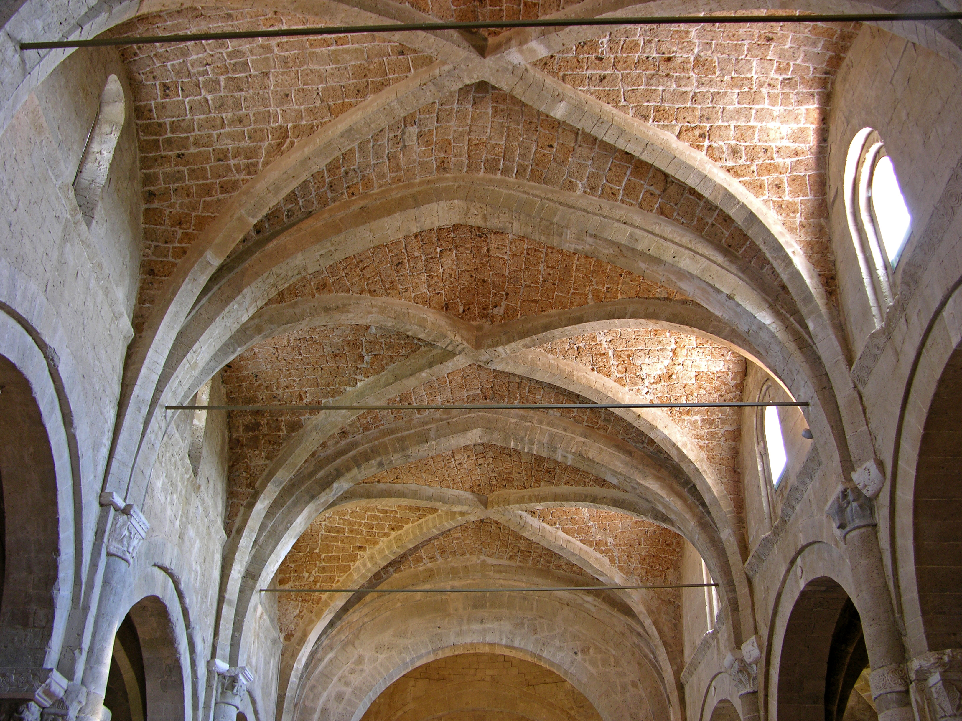 Duomo di Sovana (GR) - Le navate.